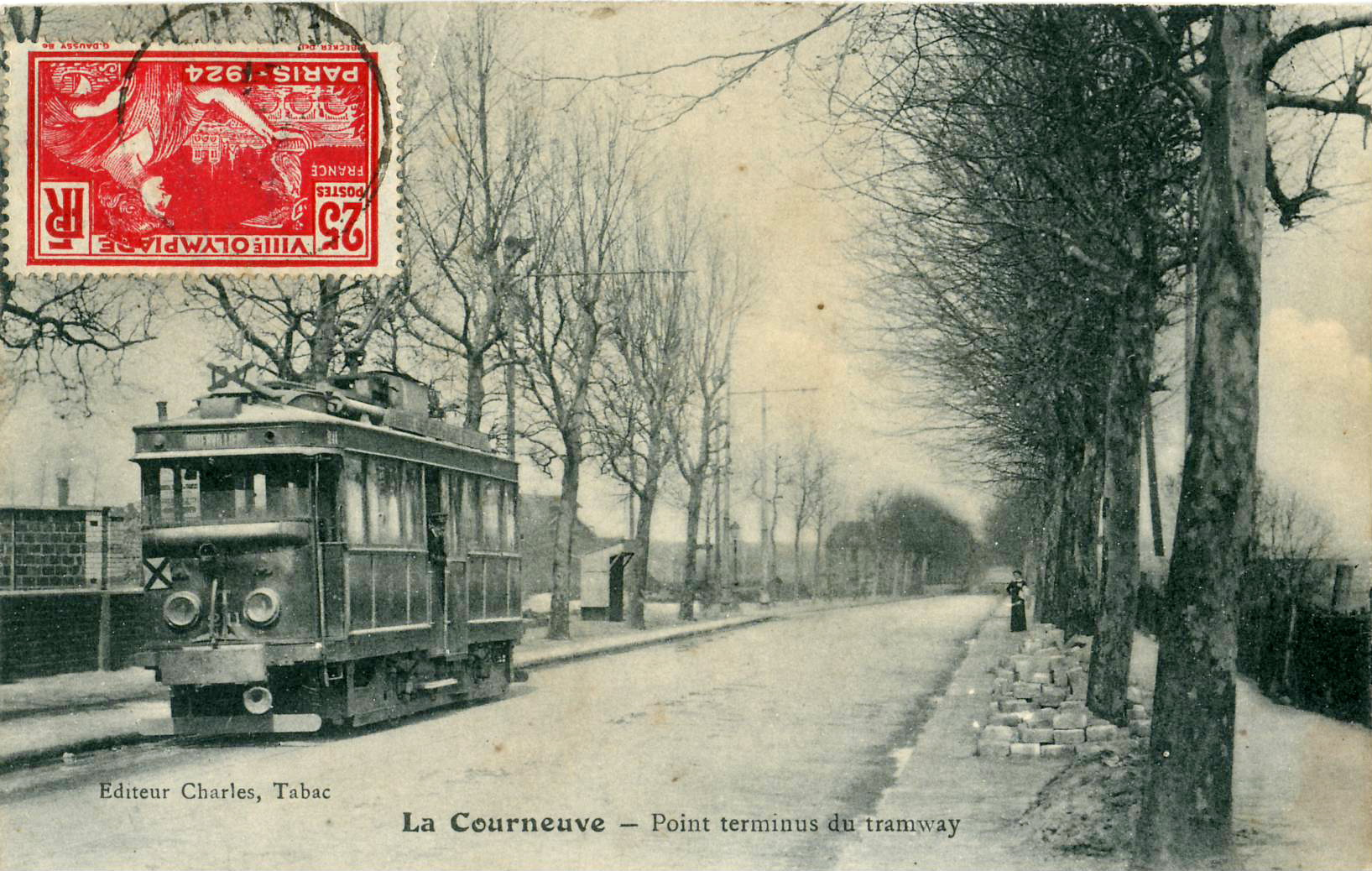 Carte postale ancienne éditée par Charles, Tabac :LA COURNEUVE - Point terminus du Tramway]